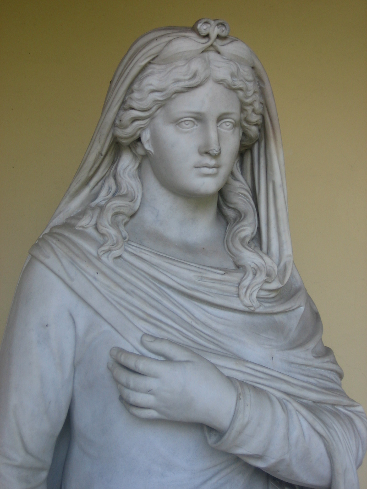 Josef von Kopf: Ingeborg mit dem Falken, klassizistische Rundplastik einer Frauenfigur auf runder Plinthe, Marmor, Höhe 2,15 m, unbezeichnet, Entstehungsjahr zwischen 1857-1873, Kratt 1998: keine Katalognummer, ursprünglich: Stuttgart, Villa Berg, heute: Stuttgart, Städtisches Lapidarium, Inventarnummer 65. Erhaltungszustand: gut, dem Falken fehlt jedoch der Kopf. (Kratt 1998 = Regina Kratt: Joseph von Kopf: 1827 - 1903; das Werk des Bildhauers mit typologischen Studien zur Büste und Gruppe, Aachen/Mainz 1998 (zugleich: Karlsruhe, Universität, Dissertation, 1995), ISBN 3-89653-248-0.) Eine antik gewandete Frau mit klassisch schönem Gesicht und kunstvoller Frisur wendet sich frontal dem Betrachter zu. Mit der linken Hand rafft sie ihr Obergewand, den rechten Arm verschränkt sie vor ihrer Brust, so dass die Hand das Herz berührt. Ihr zu Füßen sitzt ein Falke, so als würde er seiner Herrin auf Schritt und Tritt folgen.